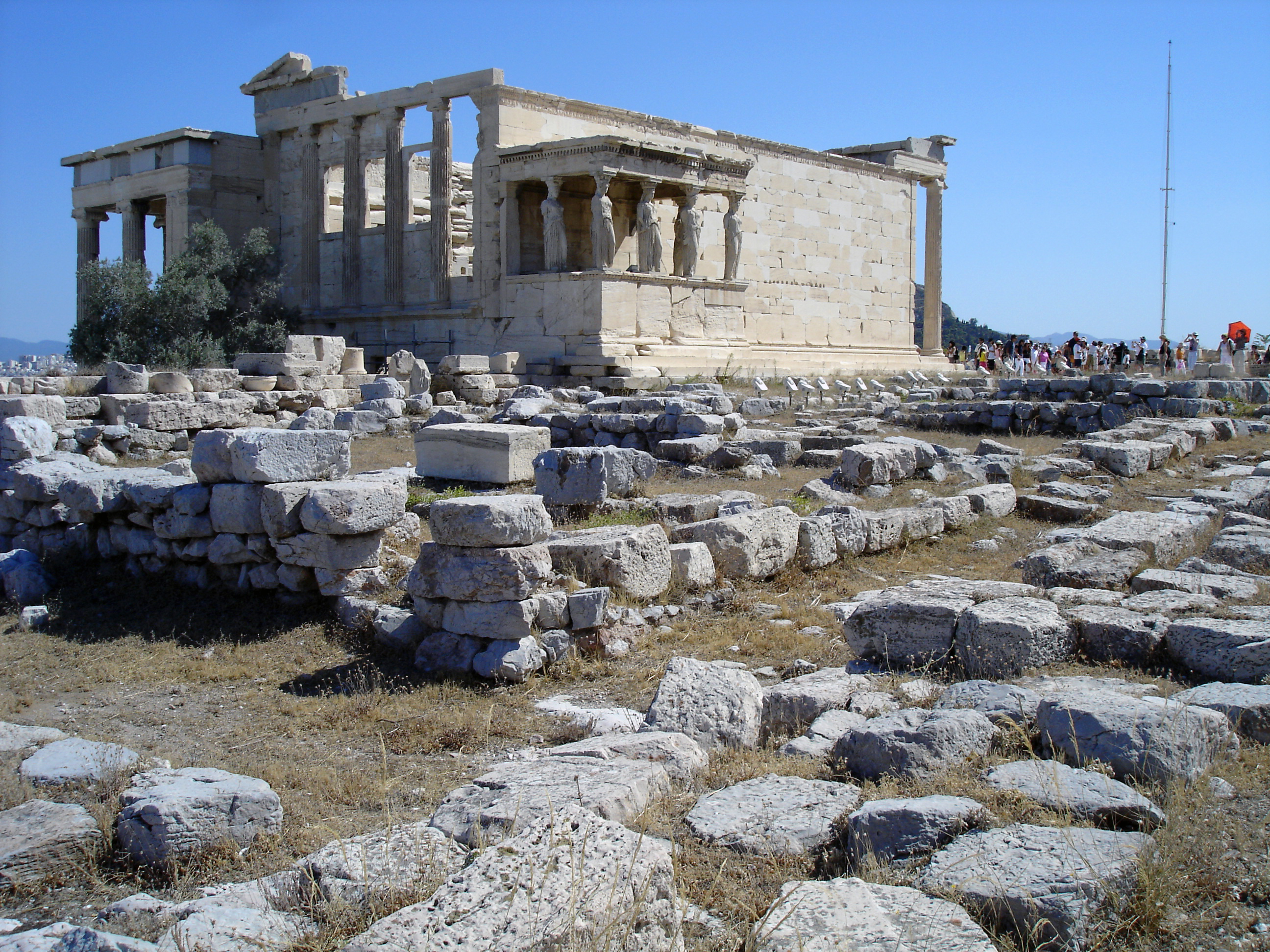 Аутор: Славен Косановић Мјесто: Акропољ у Атини - Ерехтеон